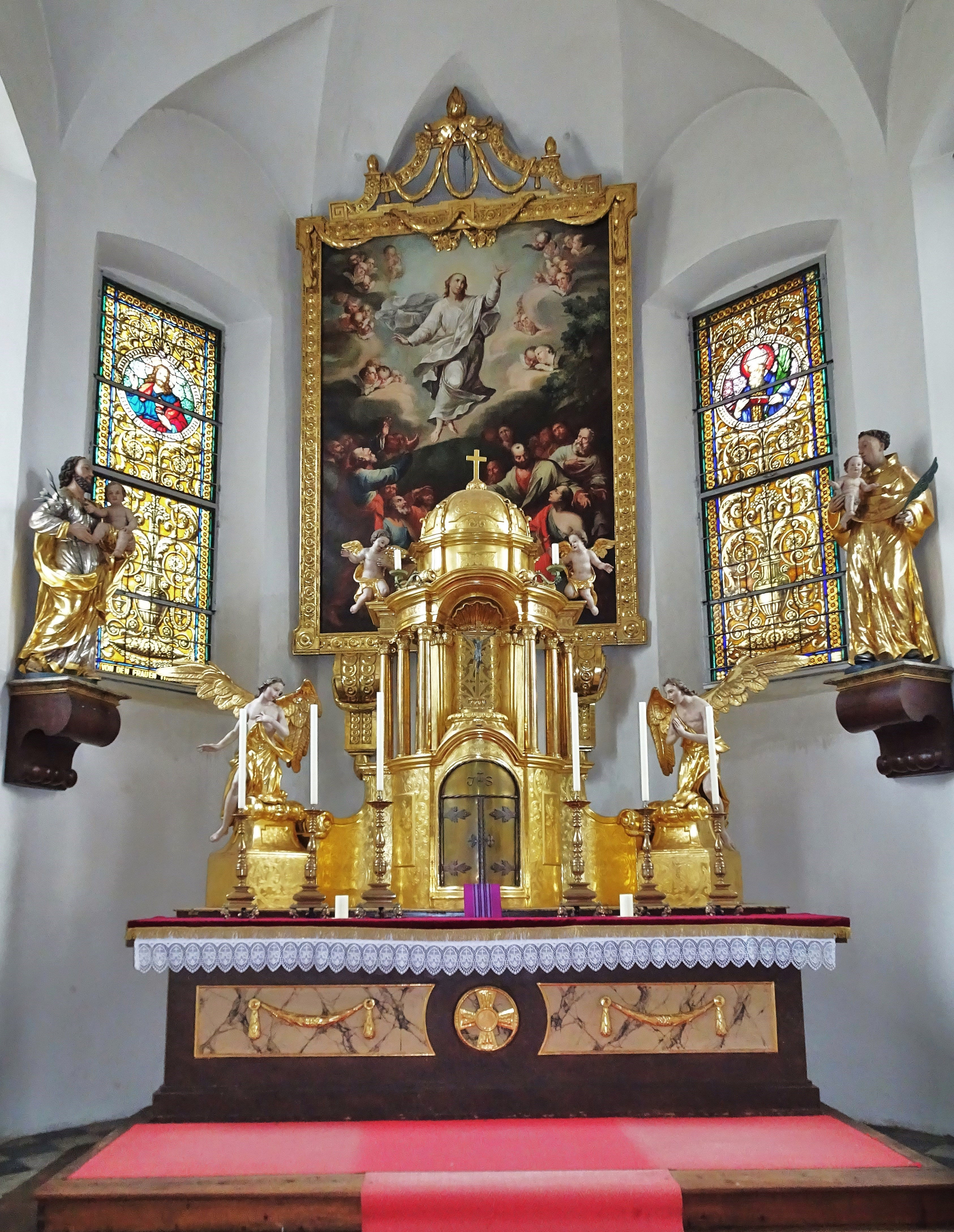 Kath. Pfarrkirche St. Maximilian Treffen, der Hochaltar